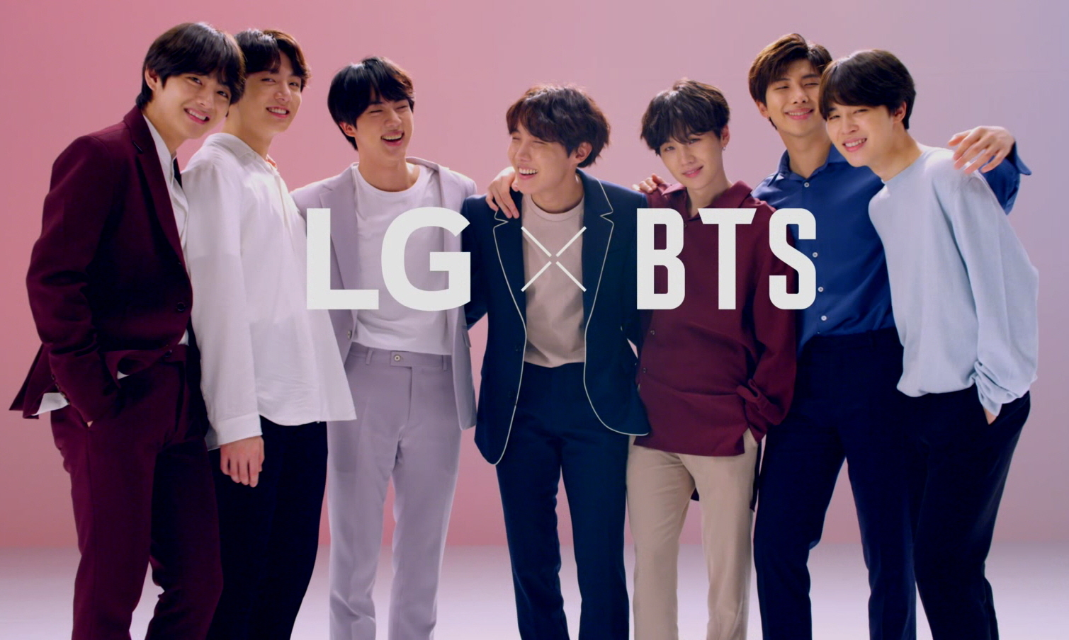 LG전자가 지난 달 3일 공개한 방탄소년단의 LG G7 씽큐 동영상 광고들이 유튜브, 페이스북, 인스타그램과 트위터 등 온라인에서 50일만에 총 1억 5천만 뷰를 돌파했다. 1초에 약 35명이 방탄소년단이 출연한 LG G7 씽큐 광고 동영상을 클릭한 셈이다. 방탄소년단이 소개한 LG G7 씽큐 소개 영상 캡처화면.